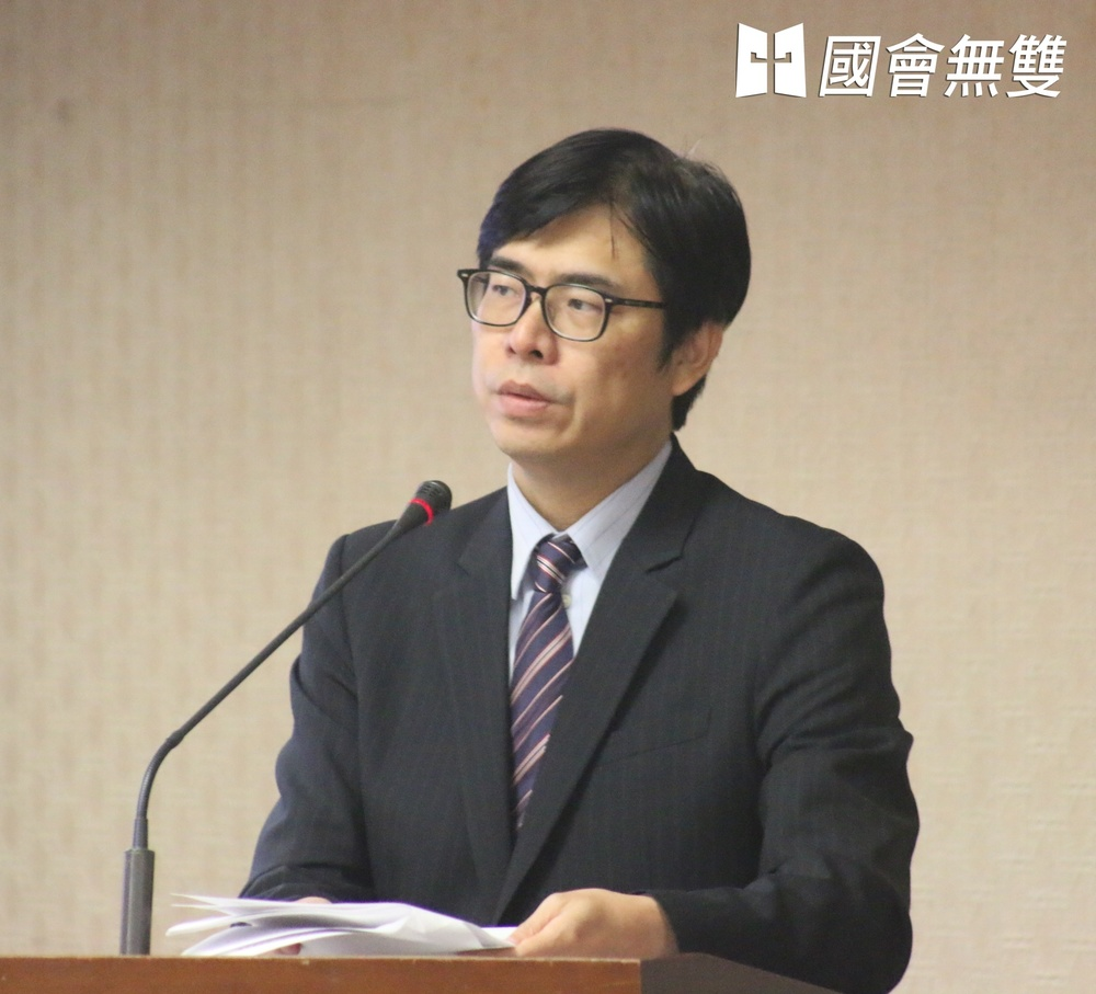 中文（台灣）: 立委陳其邁於質詢時痛批，政院提供的三二四調查資料多是「言不及義的廢紙」，關鍵資料都不給，憑什麼要求解凍預算？